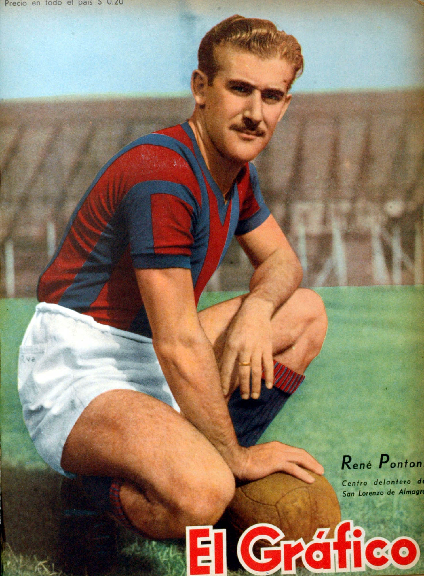 El Grafico del 27 de Abril de 1945. Edicion 1346